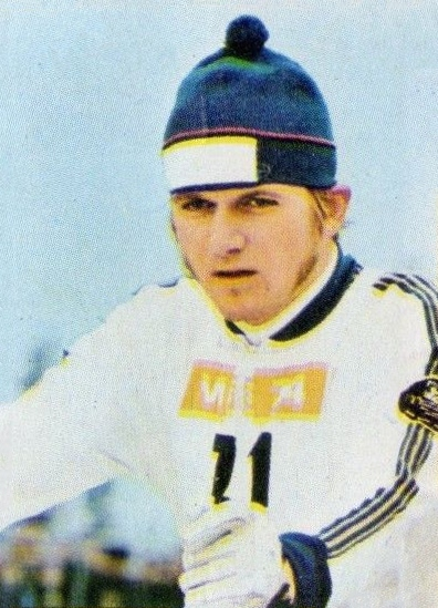 SPORT VEDETTES-PANINI 1974-Figurina n.234- MAGNUSSON- SVEZIA-SPORT INVERNALI-Rec